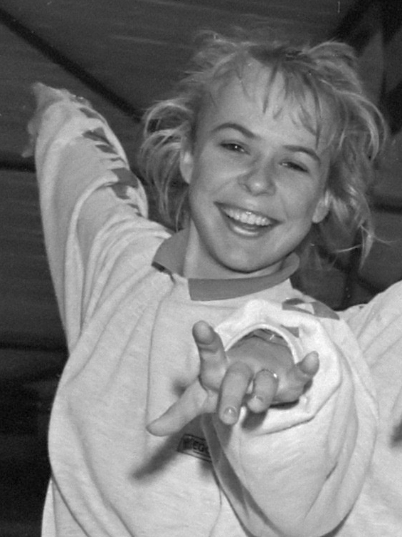 Zoetermeer, v.l.n.r. de kunstschaatsrijdsters Astrid Winkelman , Claudia Vincken , Jeltje Schulten en Li Cha Wang 8 januari 1987